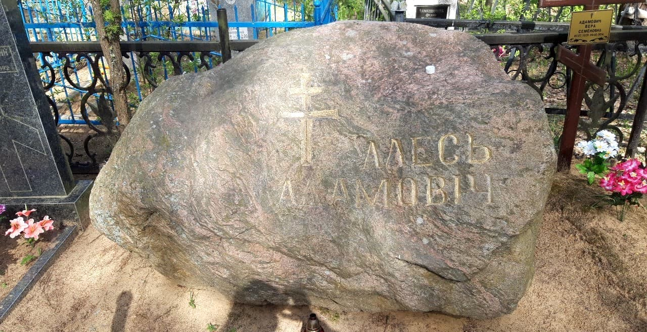 Надмагільны камень на маніле Алеся Адамовіча